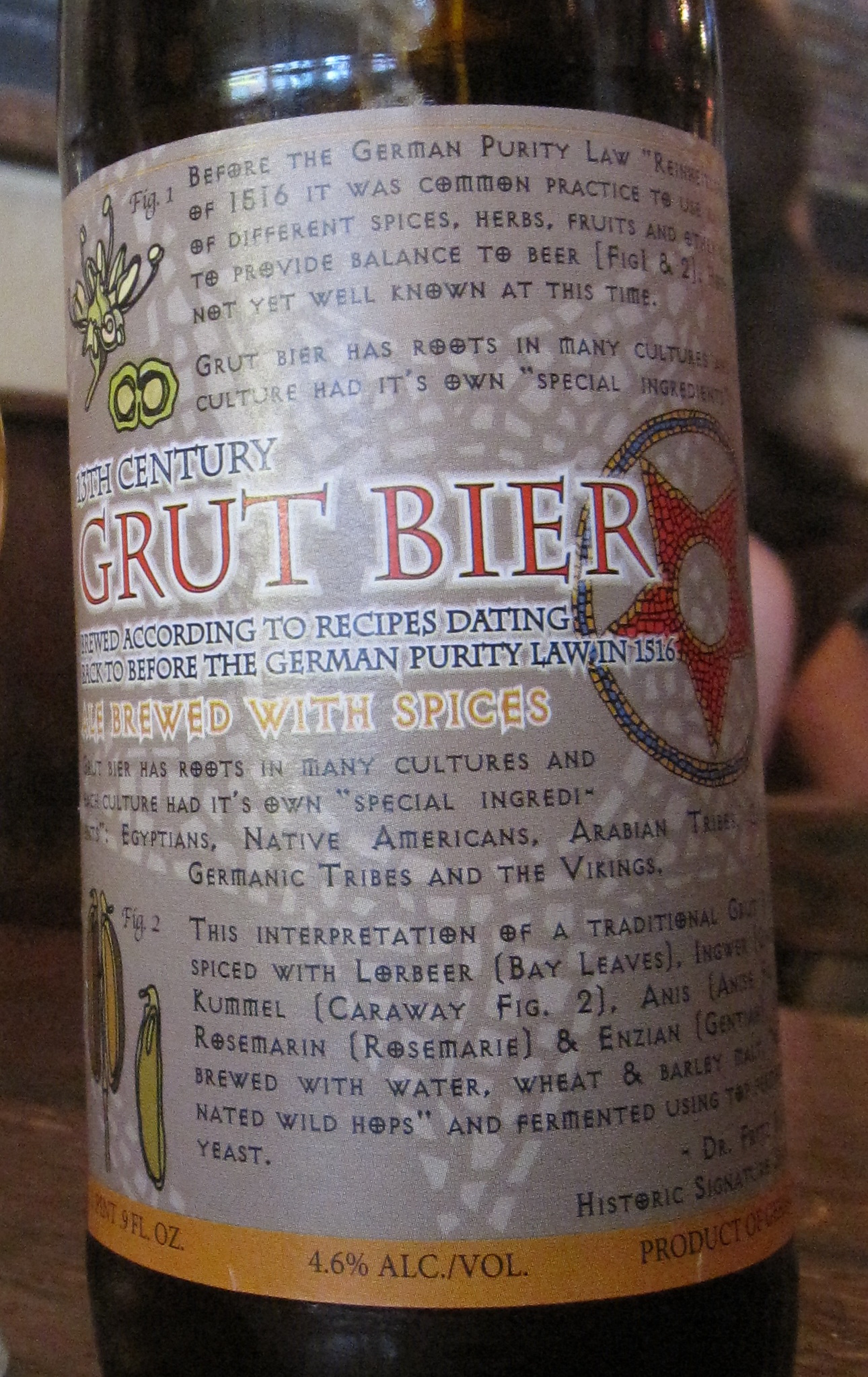 Пиво, виготовлене після рецепта XIII століття з використанням трав